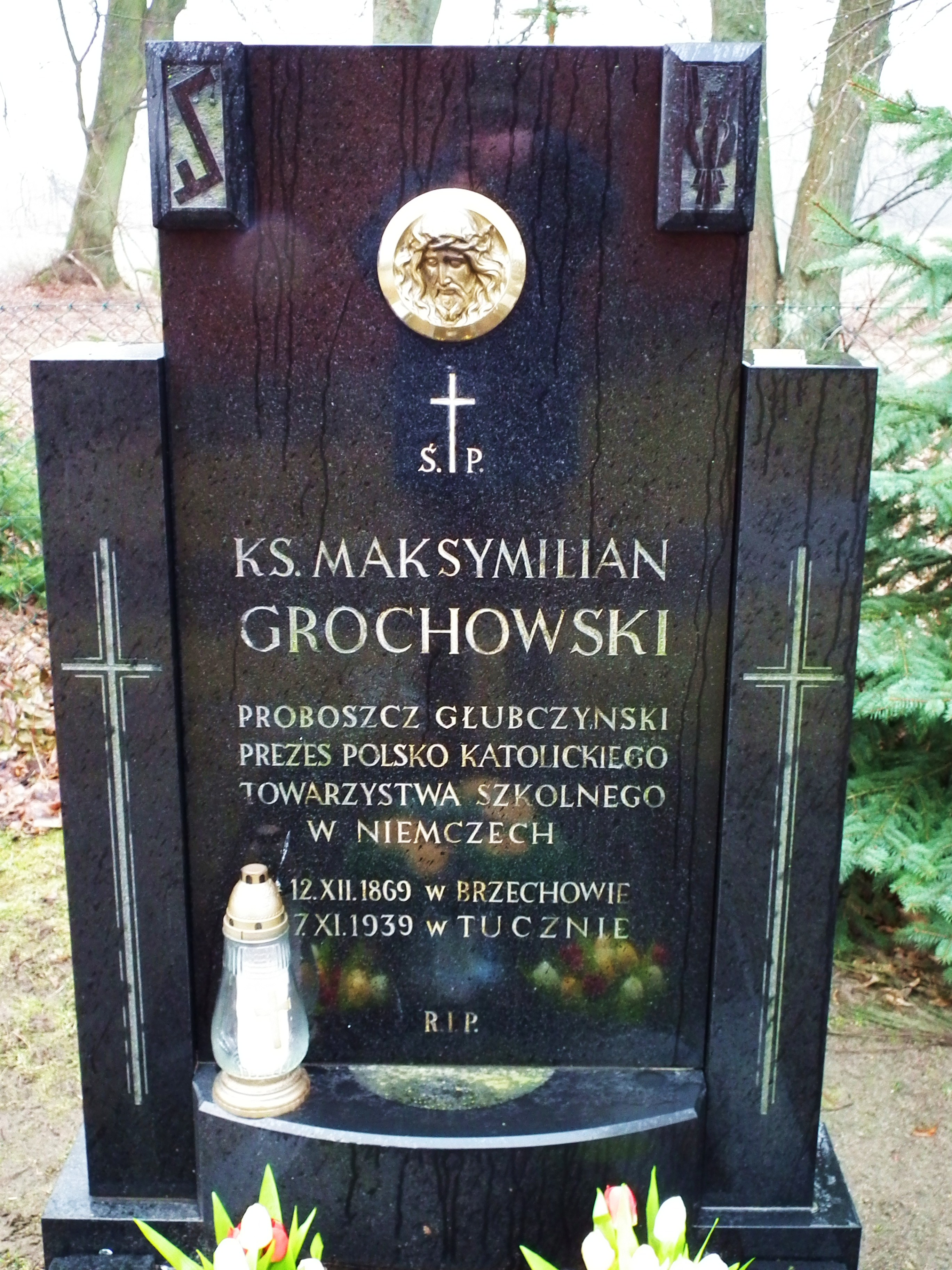 Kościół św. Jana Chrzciciela w Głubczynie.